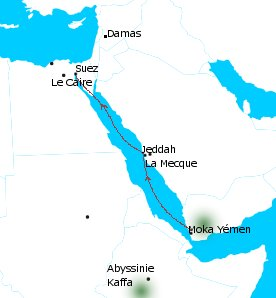 région d'origine du café : Abyssinie, Yémen (Moka)